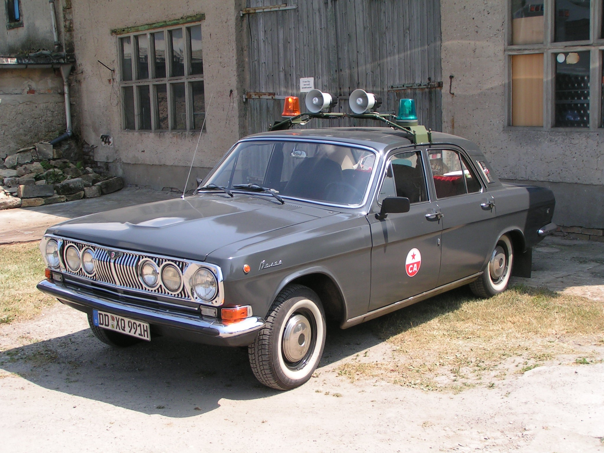 GAZ-24 Wolga mit CA-Kennzeichnung